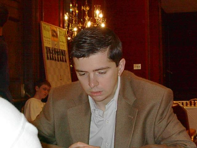 Alexander Onitsjoek